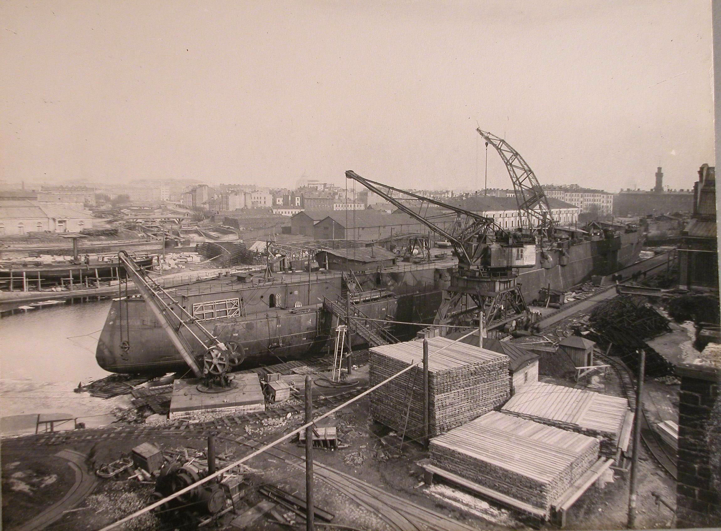 Общий вид заводского бассейна, в котором велась достройка линкора «Полтава»